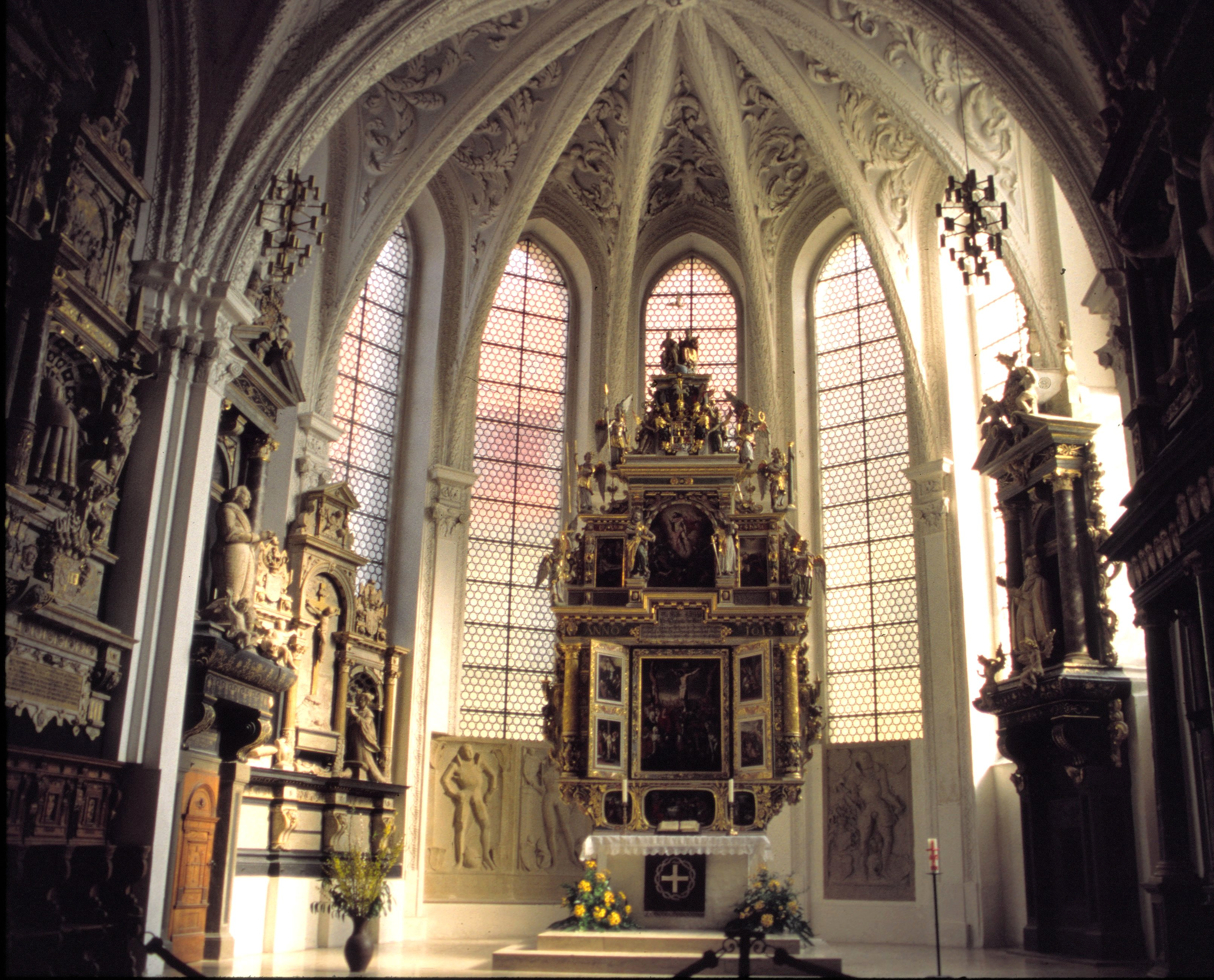 Celle-St-Marien-innen